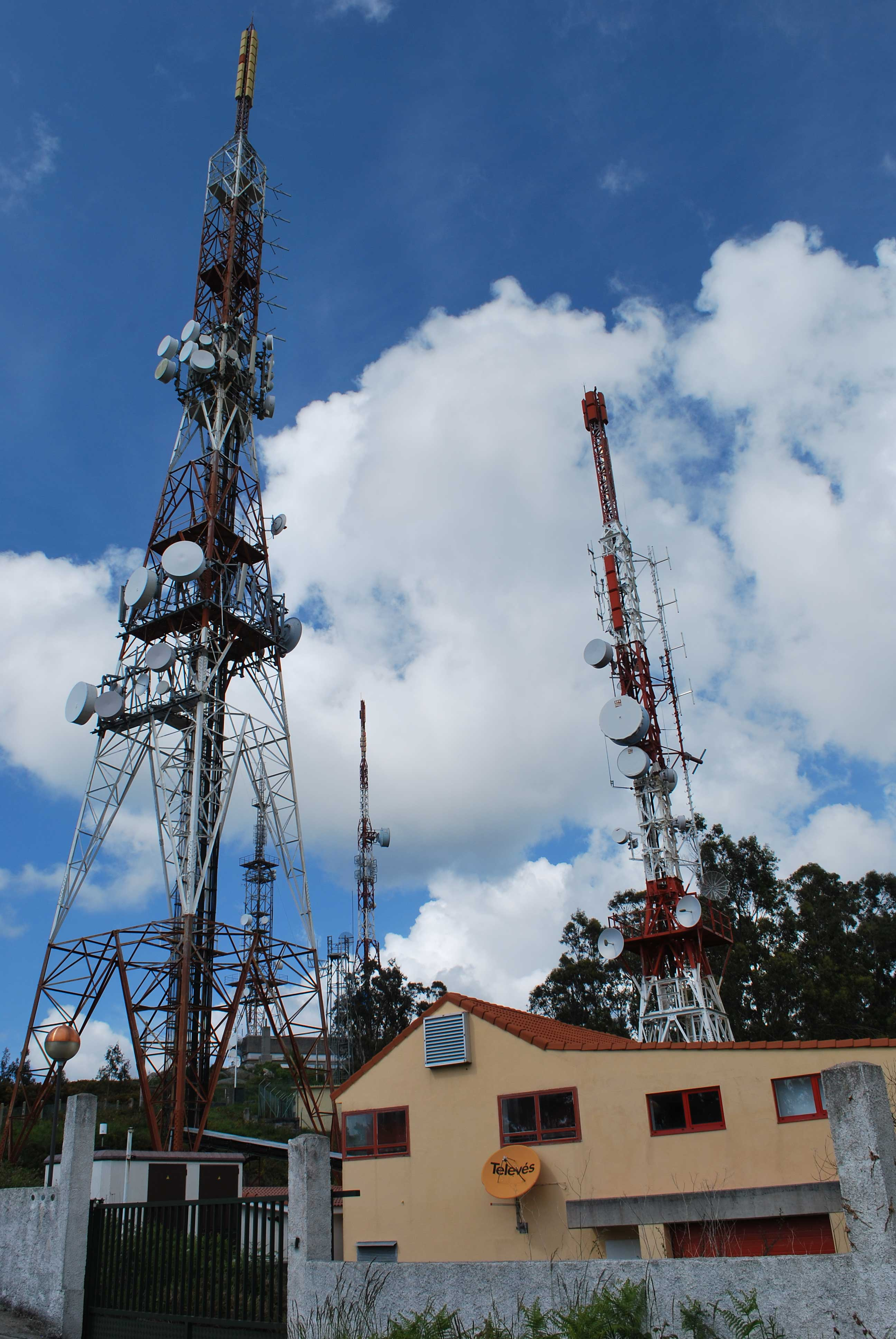 Retegal en Bailadora Ares A Coruña Galiza Spain